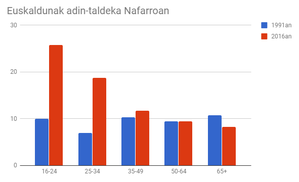 Euskaldunak adin-taldeka Nafarroan. Ehunekoetan adierazita daude datuak. 2016ko ikerketa soziolinguistikotik eskuratu dira aipatutako datu horiek.